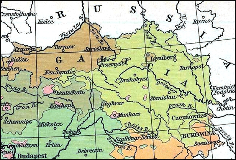 Область расселения восточных славян (русин) на Карпатах в 1911 году